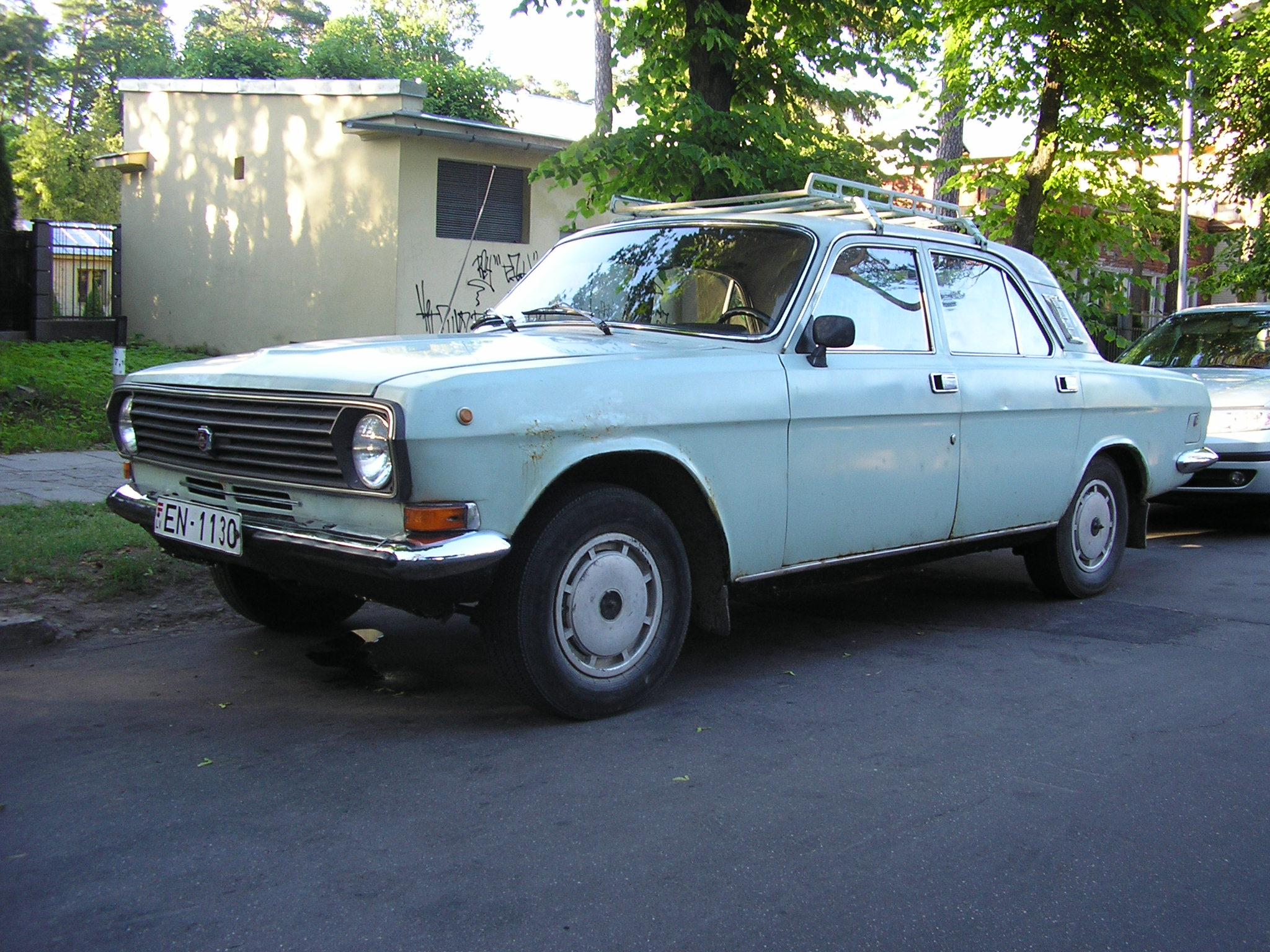 GAZ 24 Volga